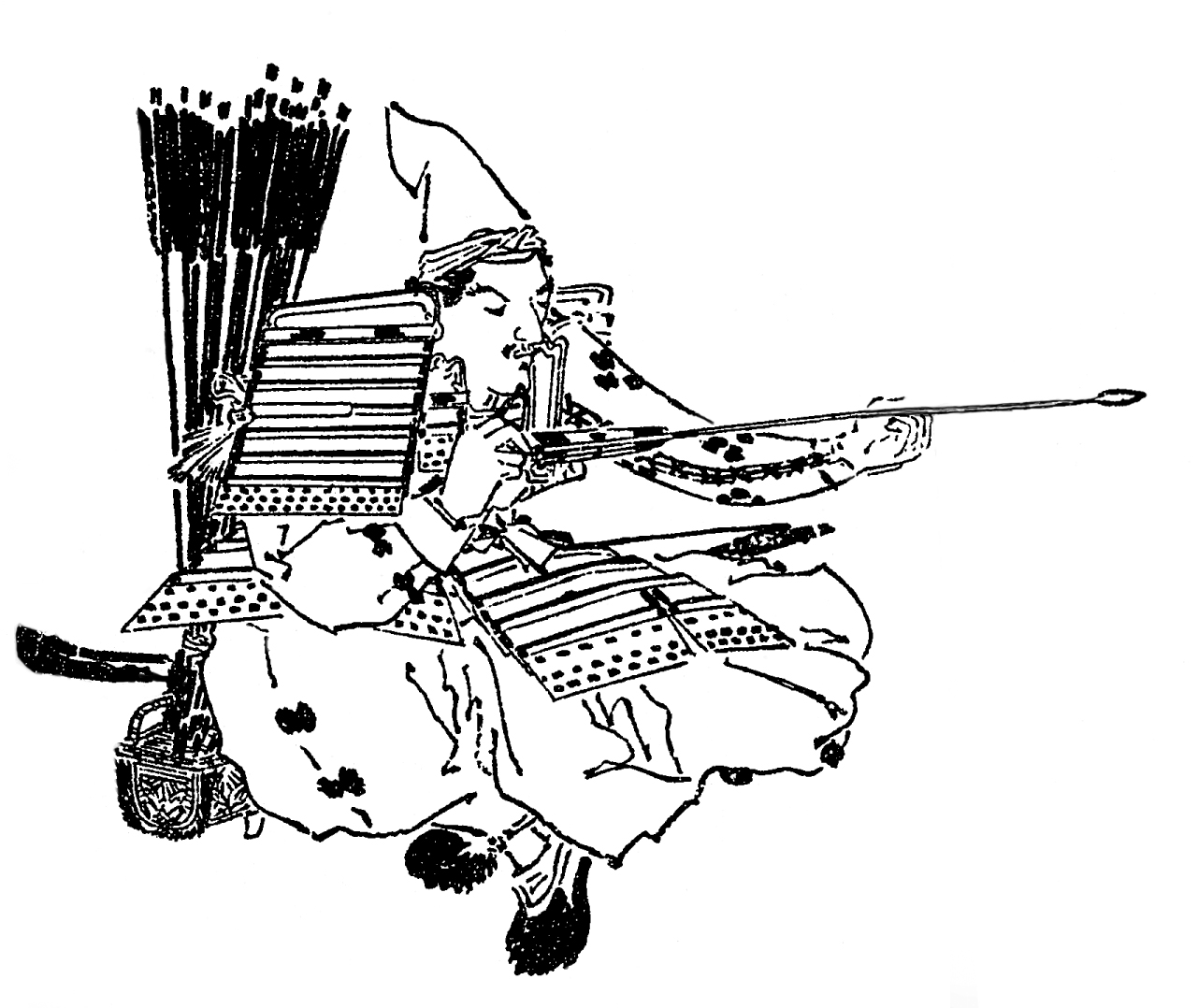 浅利義遠。平安時代末期 - 鎌倉時最初期の武将。／江戸時代『前賢故実』より。画：菊池容斎